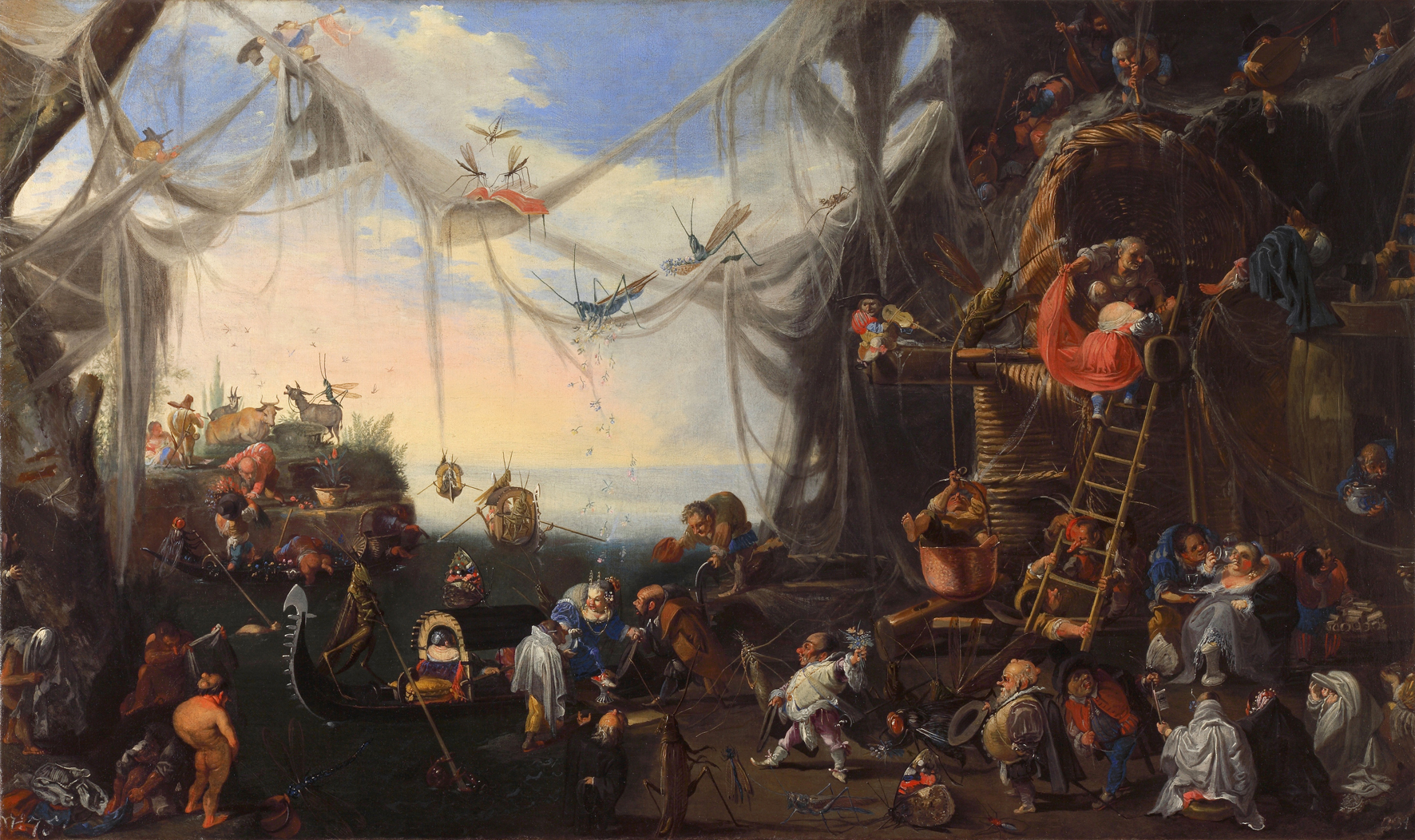 L'arrivo della sposa.